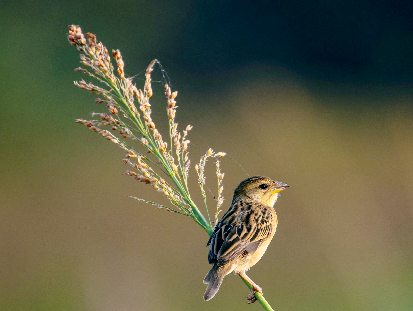 ఆడ పక్షి